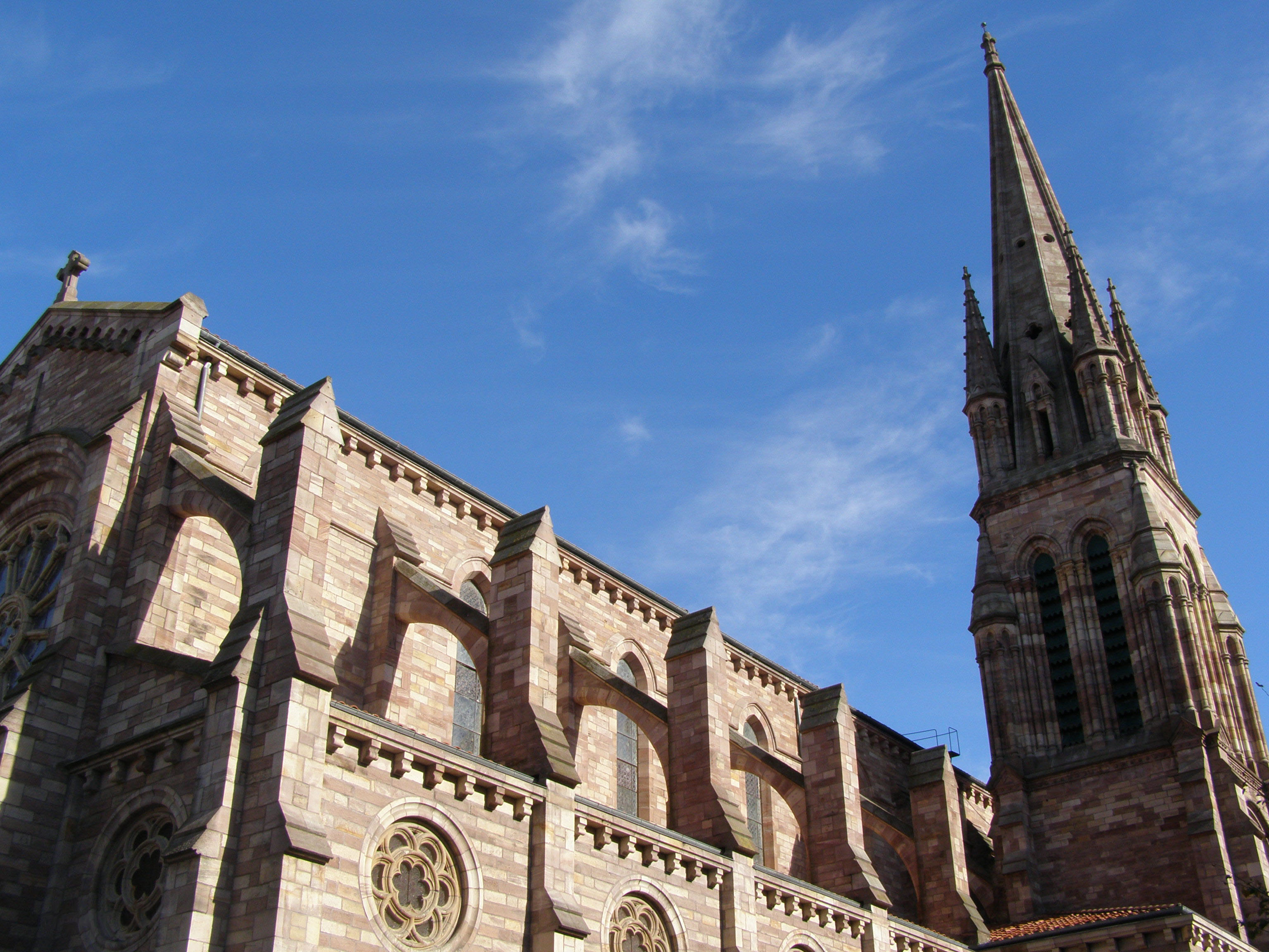 Iglesia de la Asunción, Torrelavega, Cantabria. Esta foto participó en el juego En un lugar de Flickr. Se trata de adivinar el lugar de la fotografía. No contestes si no estás registrado en el juego. Si deseas contestar, únete primero. Muchas gracias.